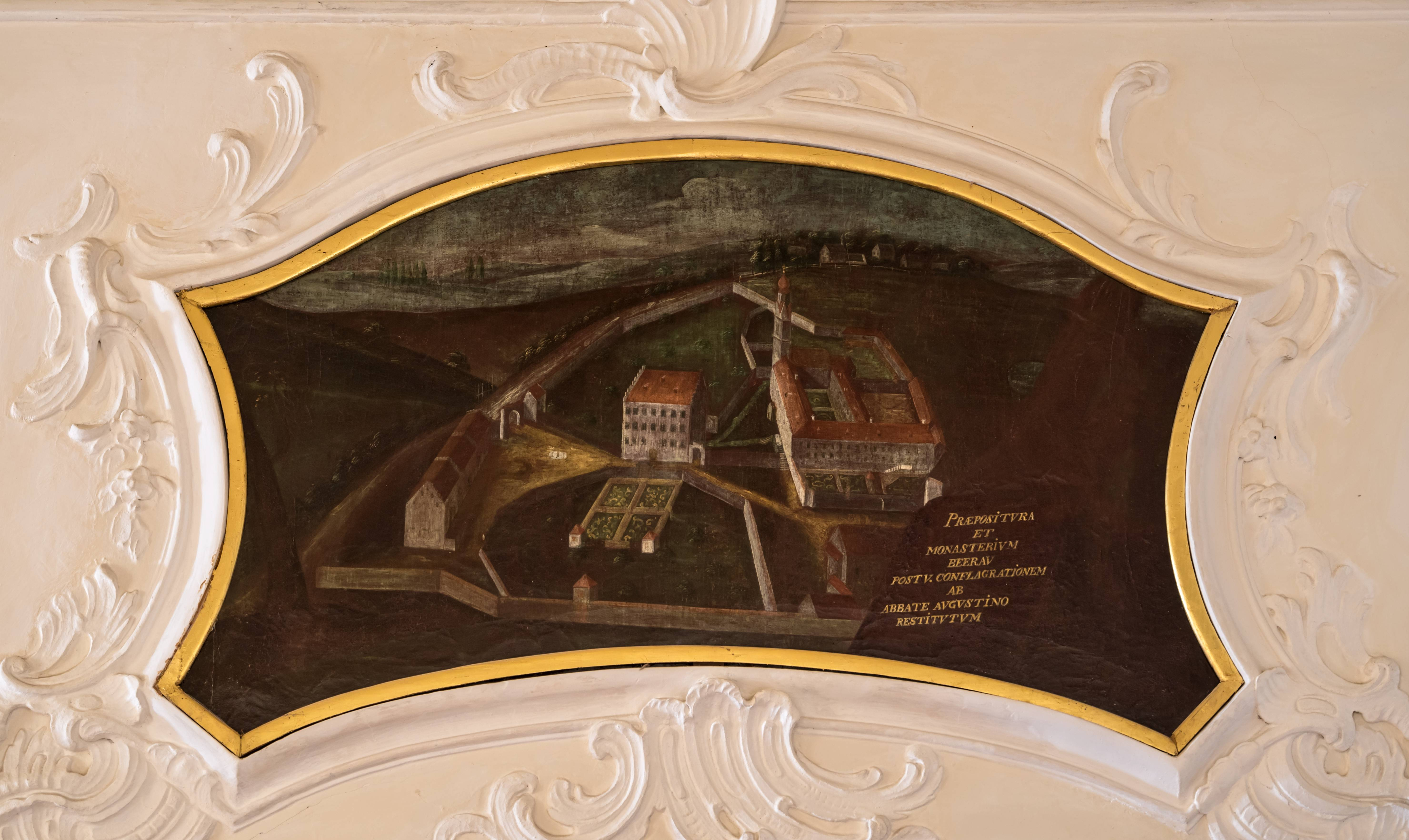 Bilder aus dem Schloß Bürgeln Hier Bilder von den Supraporten im ersten Stock des Schloßes. Es sind Bilder der Probsteien des Kloster St. Blasien und einige Füllbilder in einem später erstellten Flügel Kloster Berau PRAEPOSITVRA ET MONASTERIUM BEERAV POST V. CONFLAGRATIONEM AB ABBATE AVGVSTINO RESTITVTVM